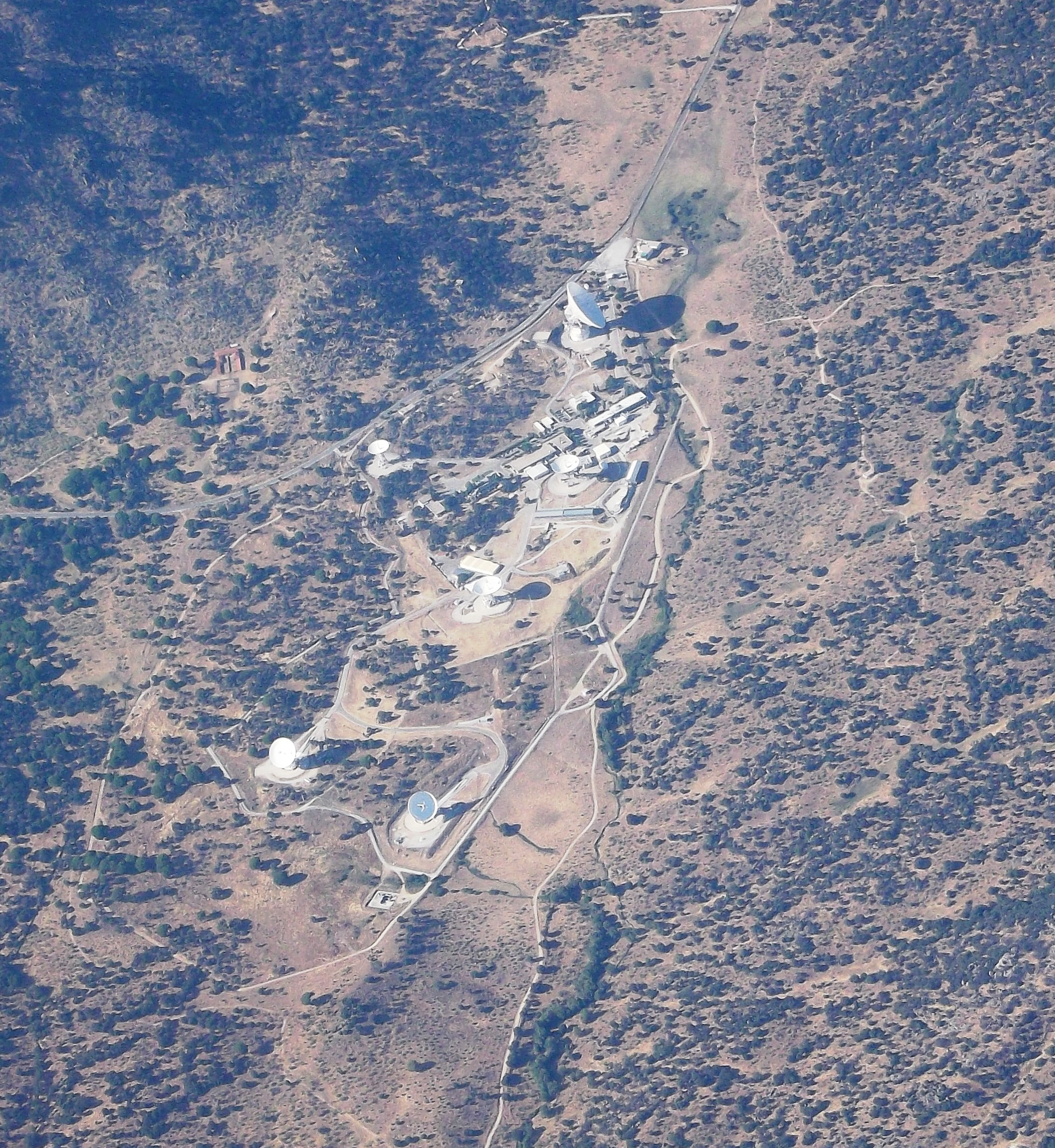 Antenas de Robledo de Chavela desde el Aire